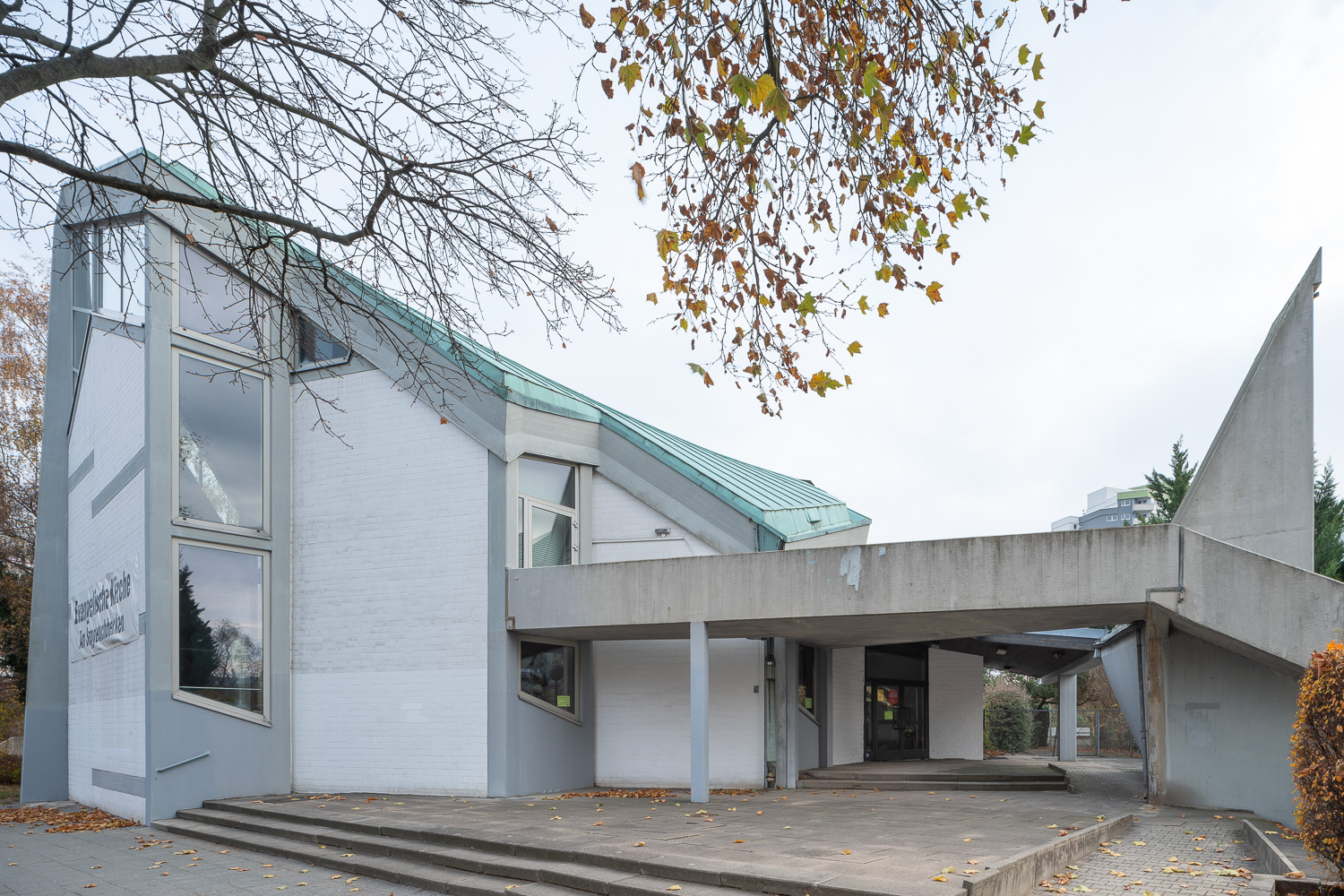 Evangelische Kirche und Gemeindezentrum am Seggeluchbecken, Finsterwalder Straße 66–68, Märkisches Viertel, Berlin-Wittenau, 1970–1972, Bodo Fleischer